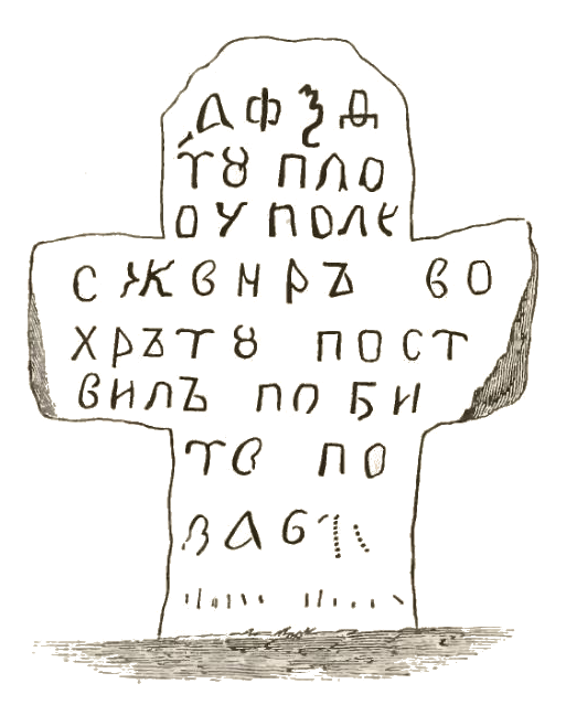 Иллюстрация книги «Белорусские древности» стр.54 илл.32